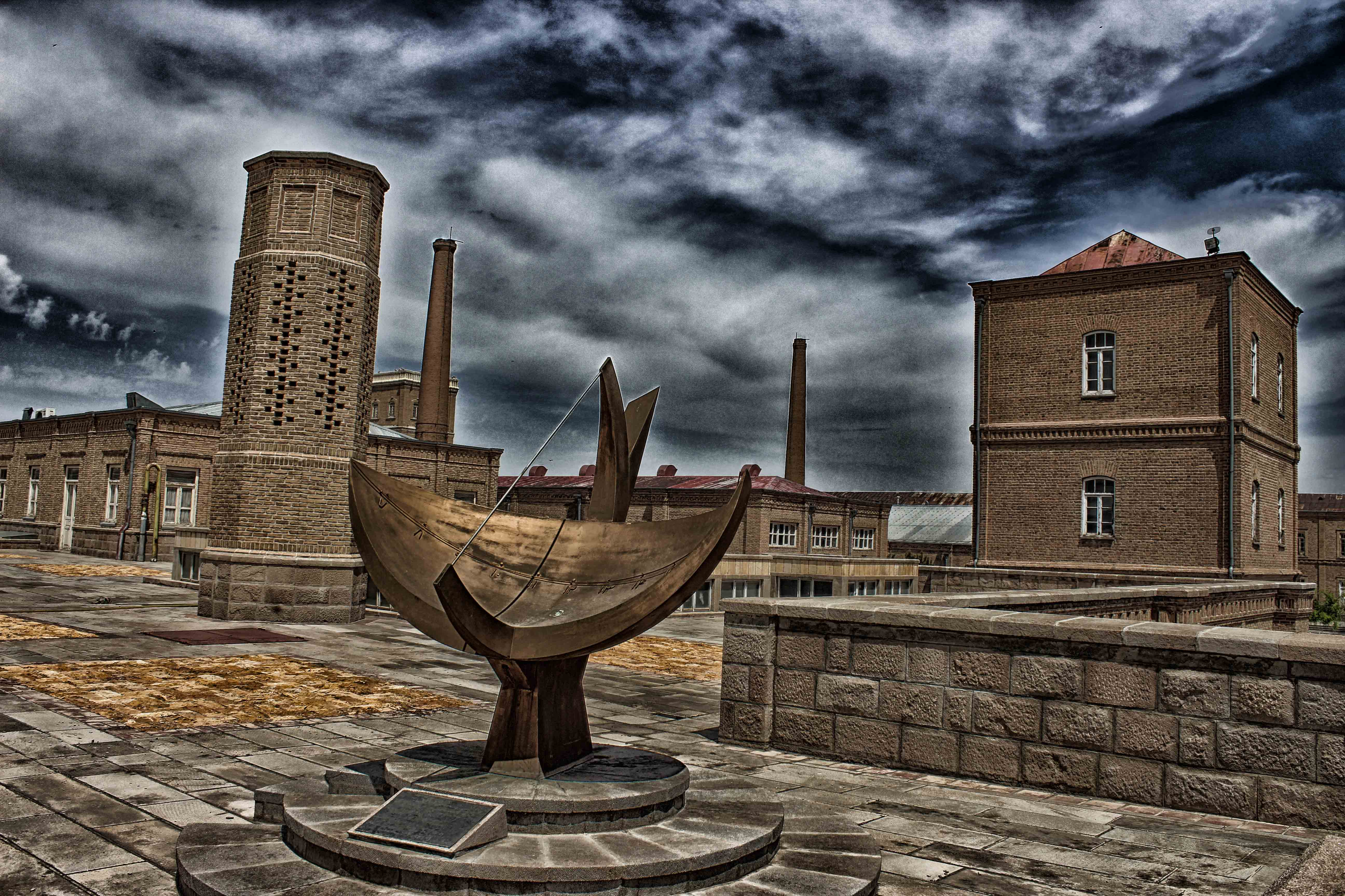 کارخانه چرم سازی